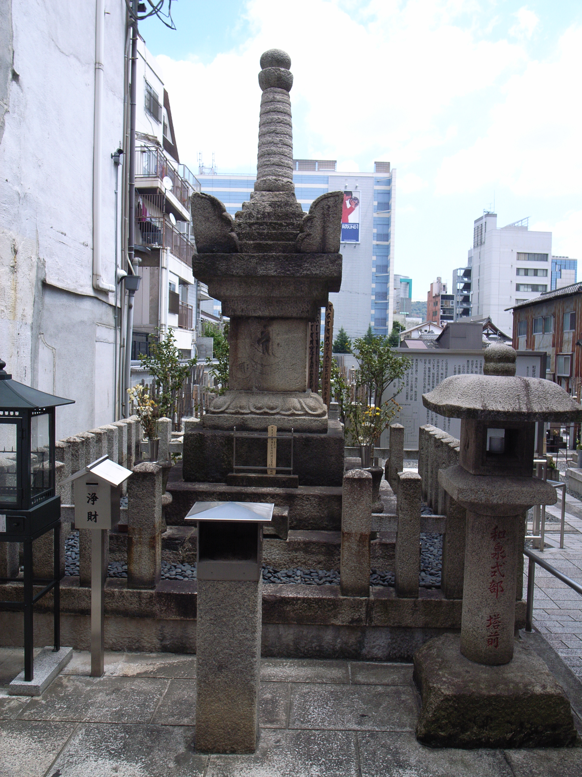 Stupa of Izumi Shikibu